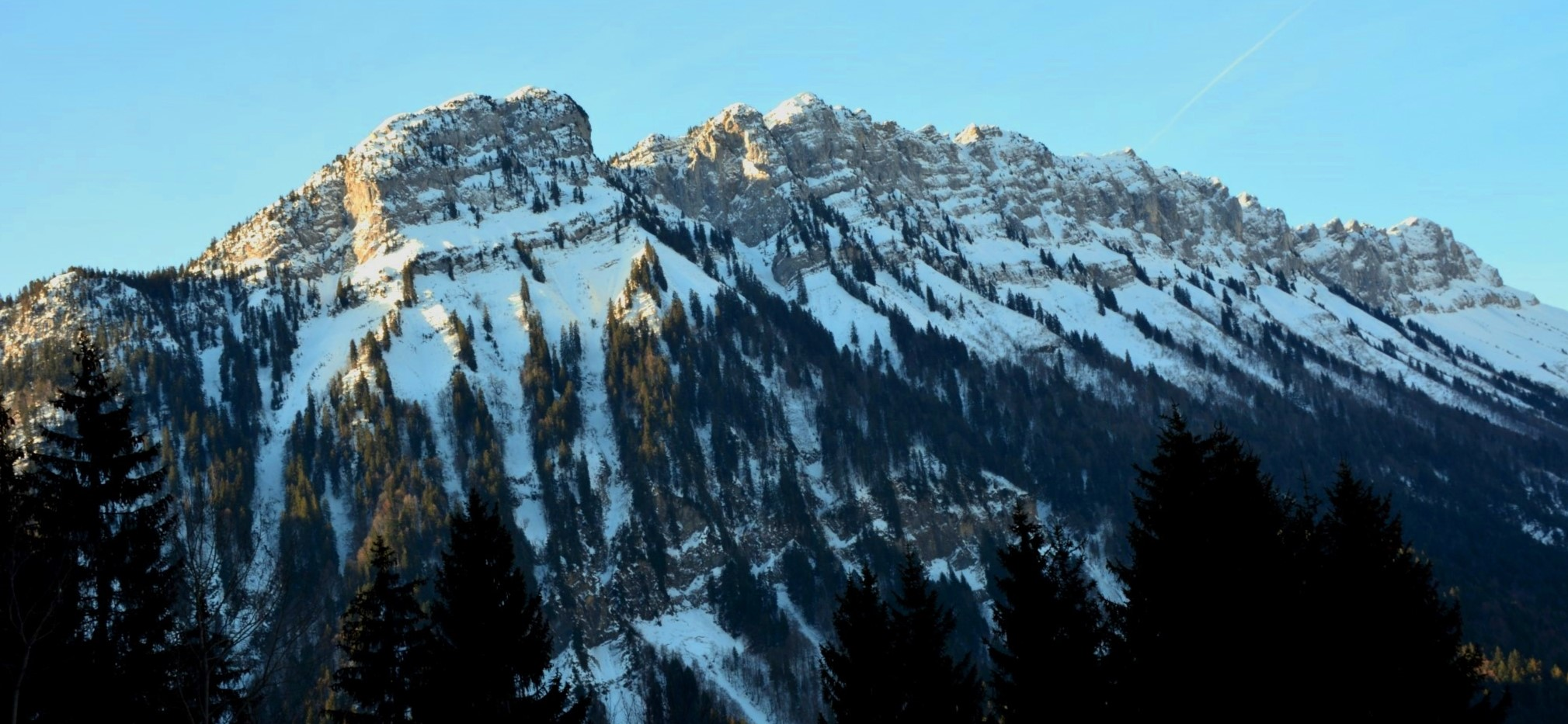 A droite la "Croix de Lachat" (2028 m), à gauche "le Suet" (1863 m) formant le verrou des "Etroits".